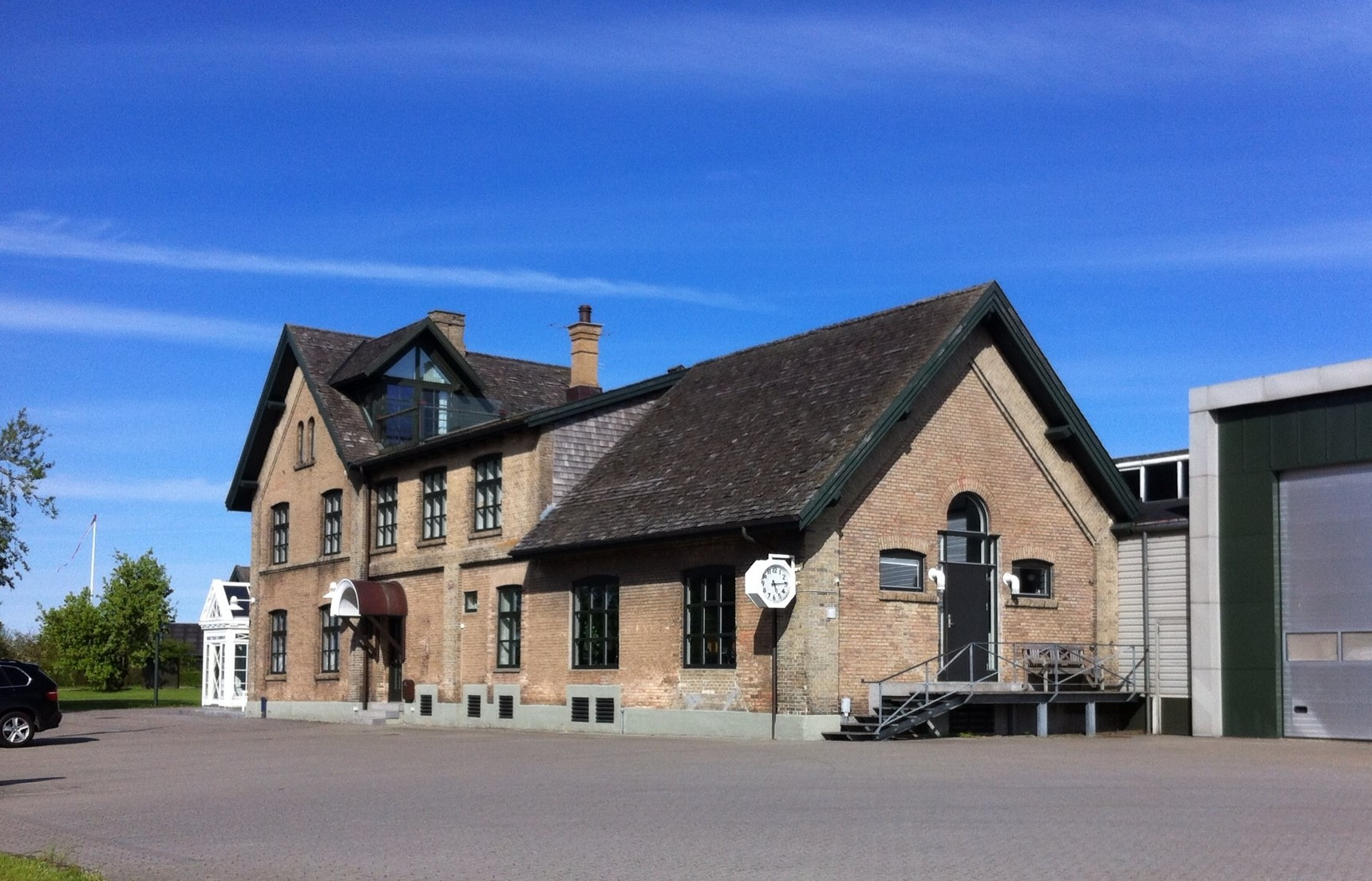 Hadsund Syd Station, Mariagervej 9560 Hadsund